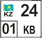 Номер мотоциклов Казахстана, стандарт 2012 года